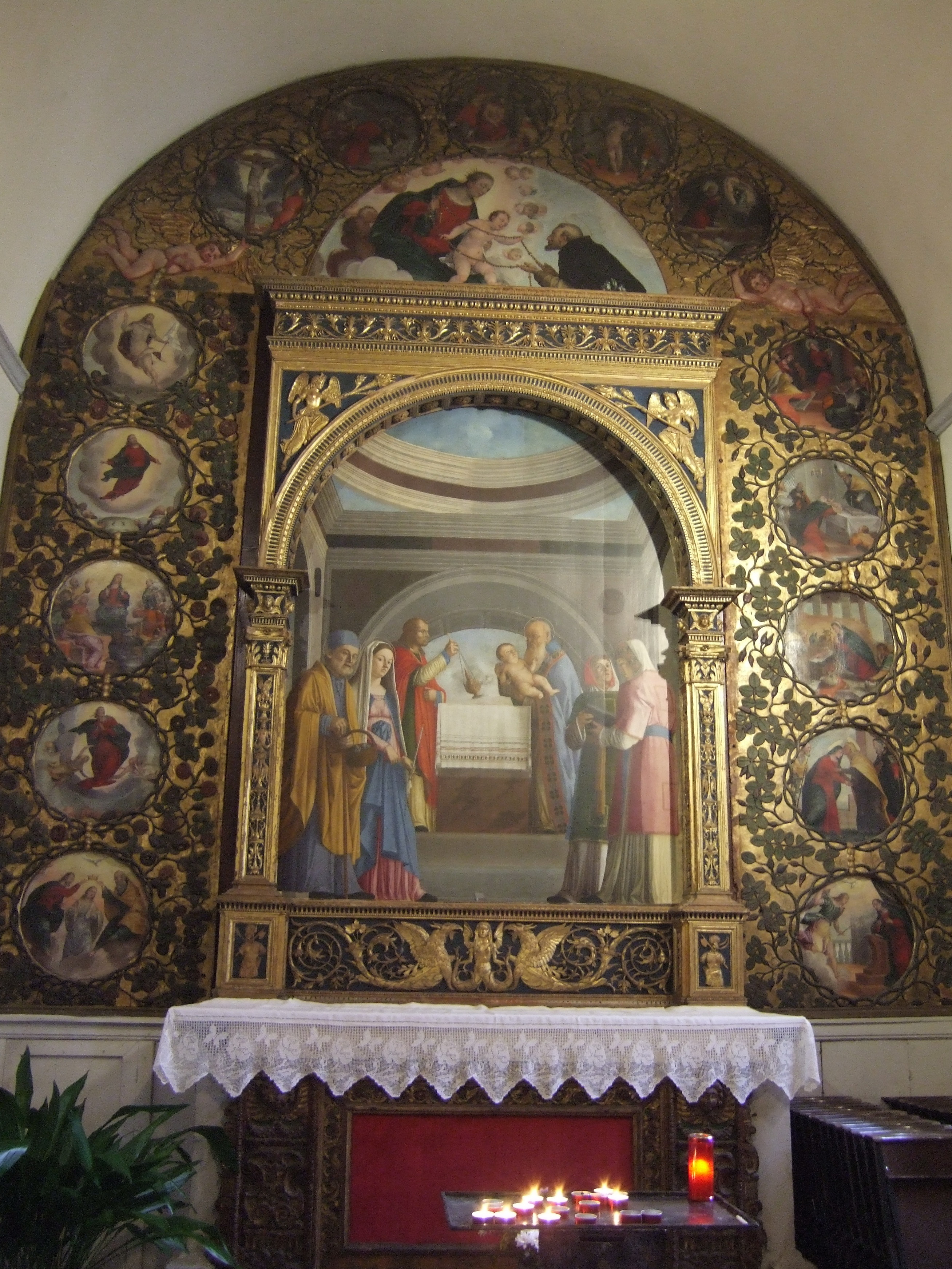 Duomo di Spilimbergo - Giovanni Martini - Presentazione al Tempio